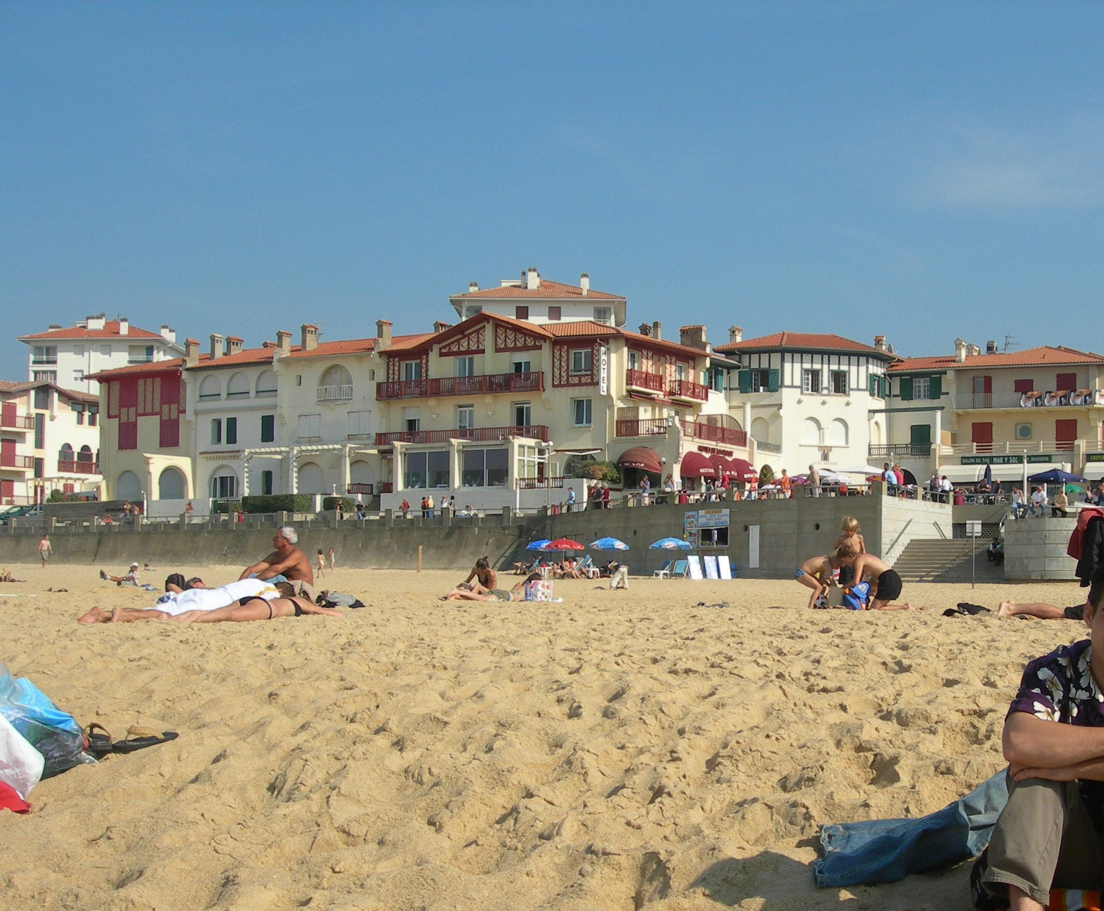 Vue des bâtiments devant la la plage de Soorts-Hossegor